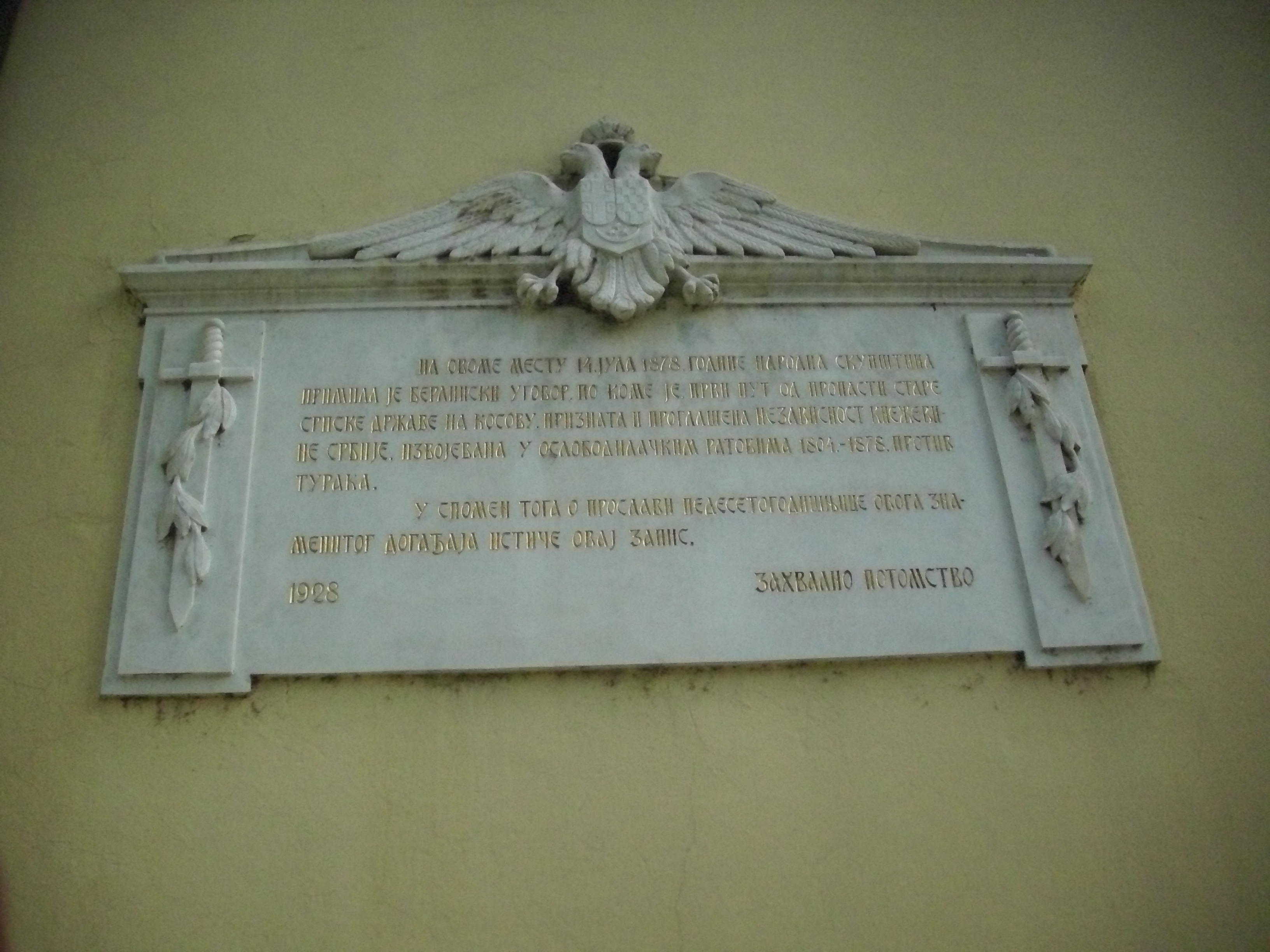 Стара црква и зграда скупштине у Крагујевцу